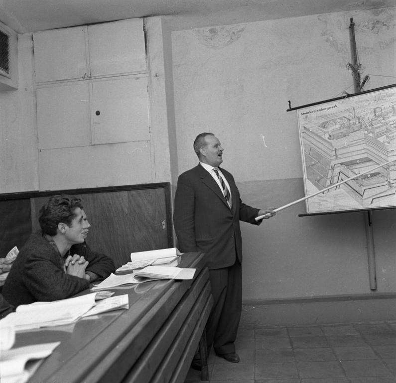 Italienische Gastarbeiter (Bergleute) in Walsum beim Unterricht